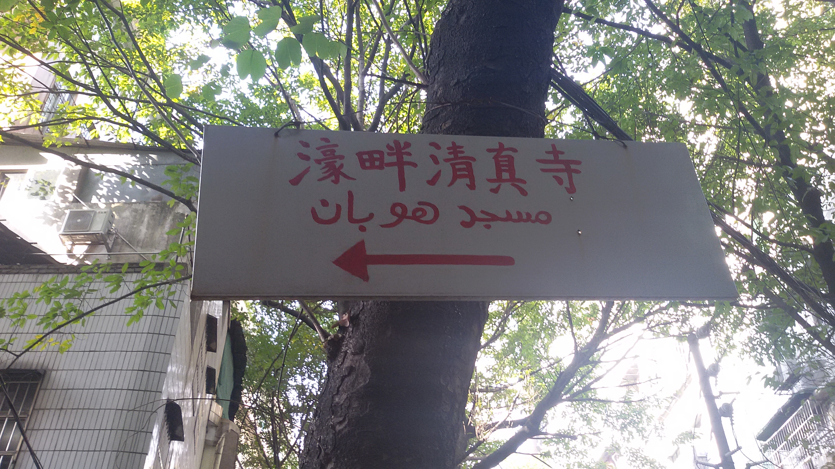 粵語: 濠畔寺嘅维吾尔文写法